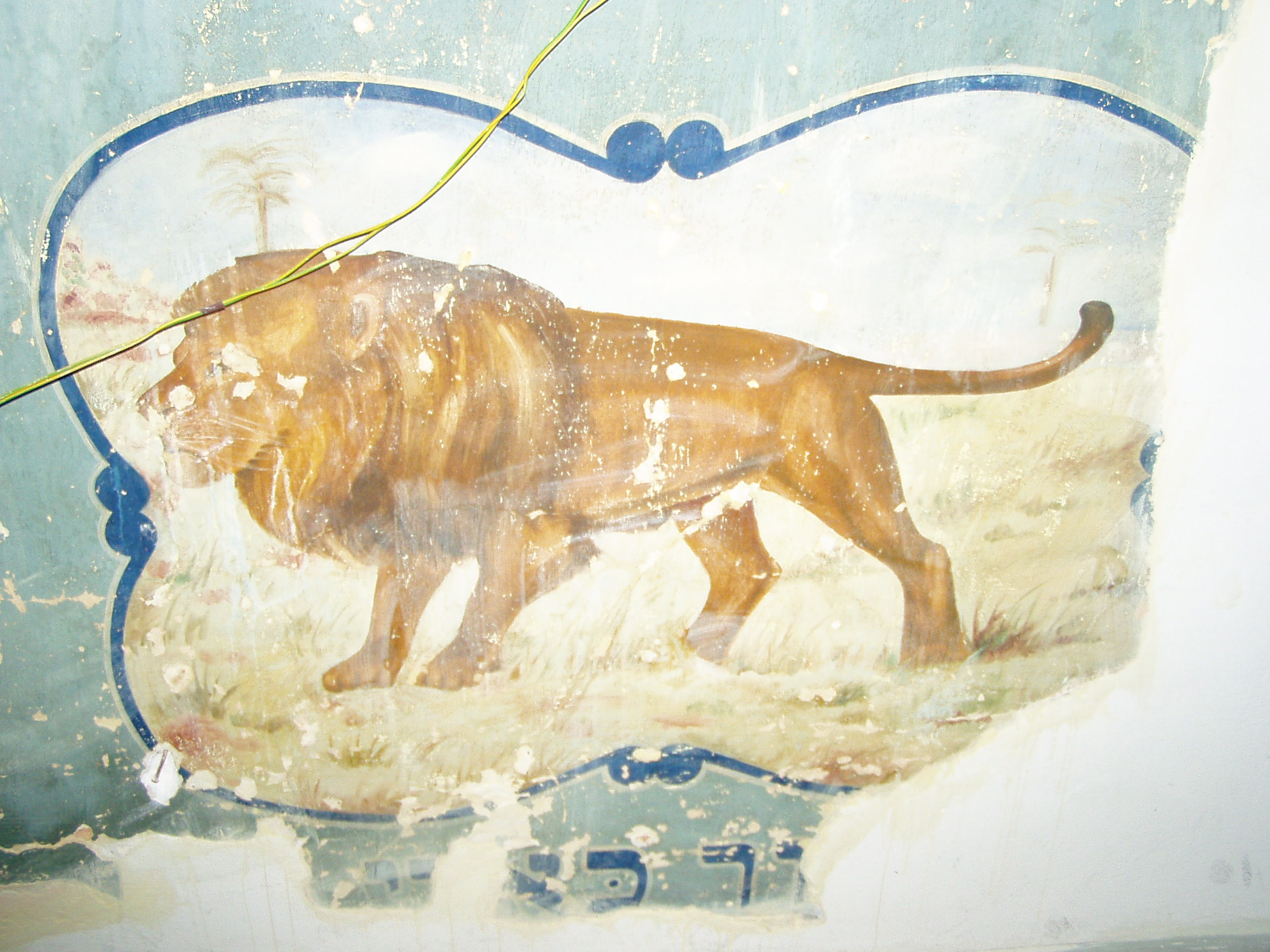 Wnetrze synagogi Chewra Thilim w Krakowie